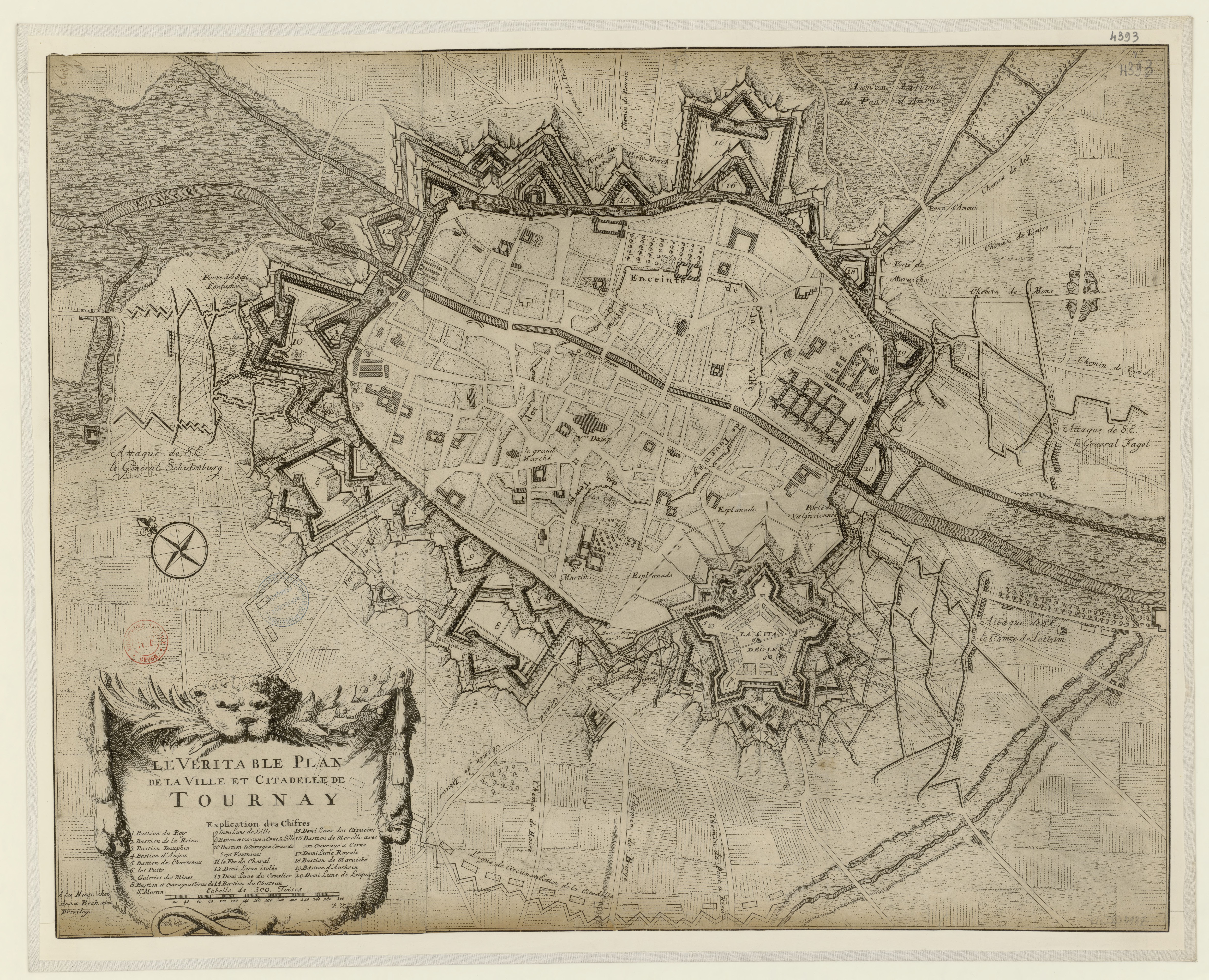 Plan des remparts et de la citadelle de Tournai en 1703.